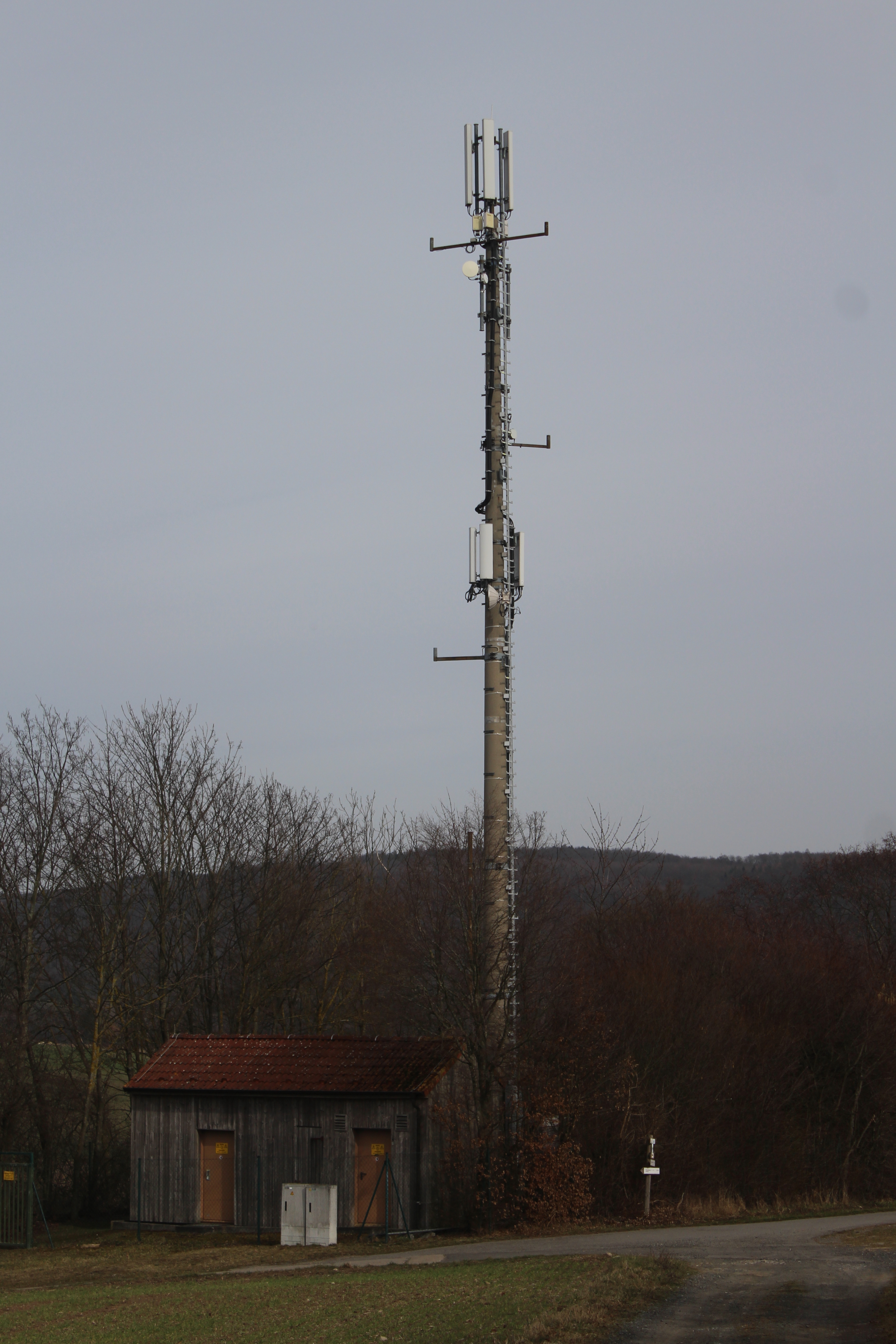 Sender Königsberg in Bayern